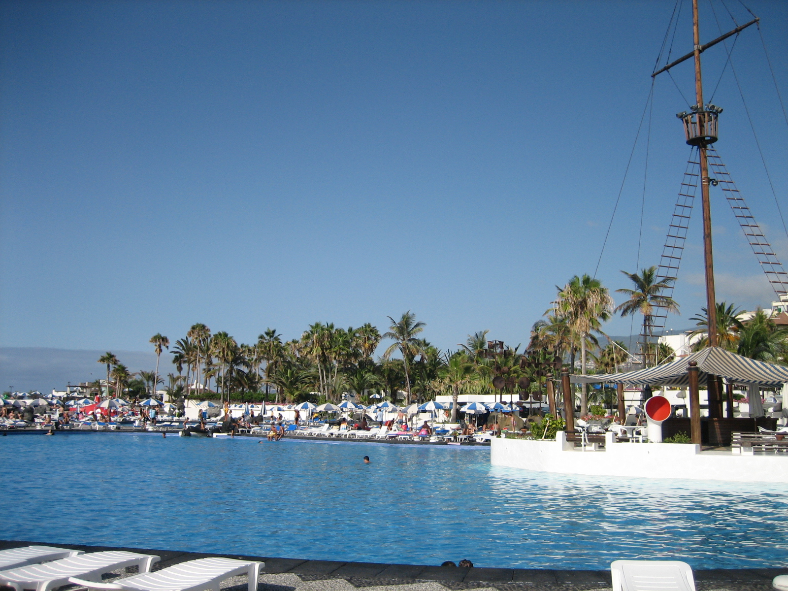 Alisios II in Lagos Martiánez, Tererife